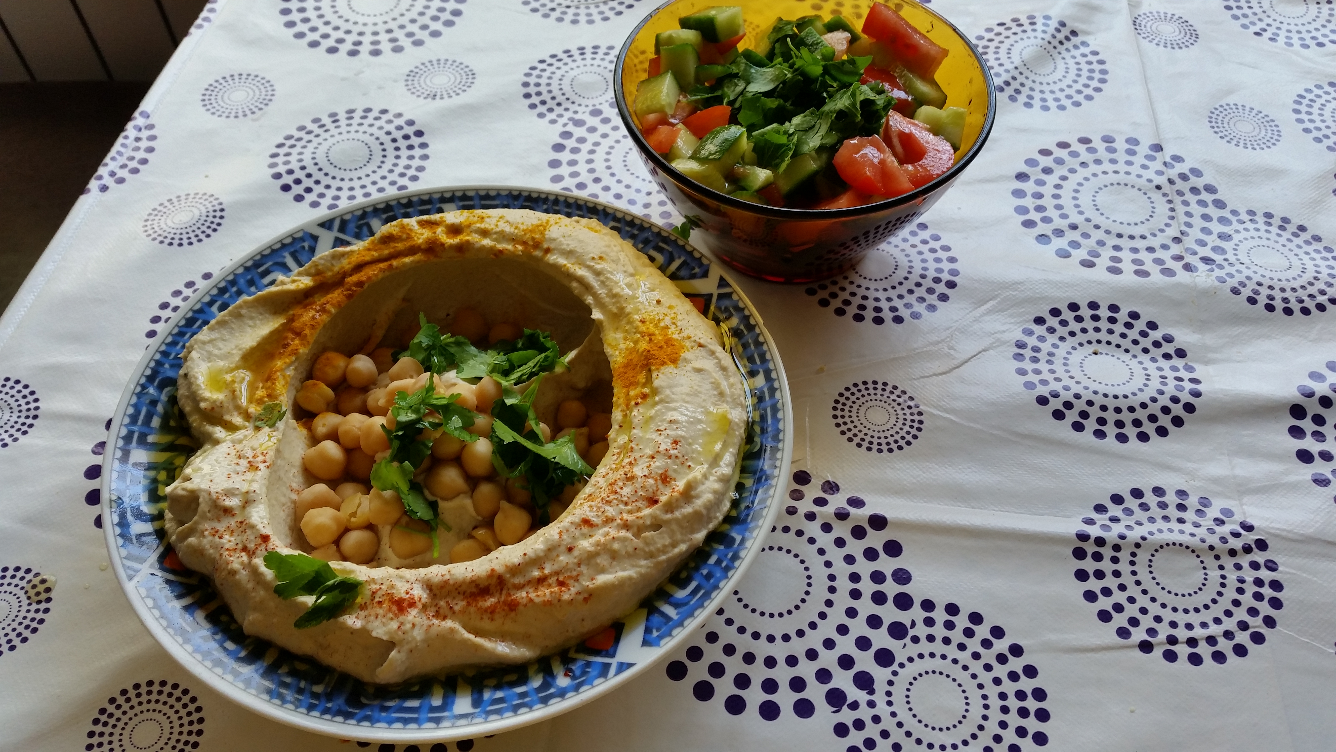 צלחת מלאה בחומוס עם תוספת גרגירים וצלחת נוספת מלאה בסלט ישראלי